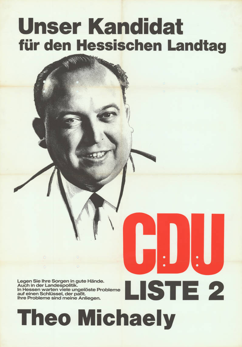 Unser Kandidat für den Hessischen Landtag Legen auch Sie Ihre Sorgen in gute Hände. Auch in der Landespolitik. In Hessen warten viele ungelößte Probleme auf einen Schlüssel, der paßt. Ihre Probleme sind meine Anliegen. CDU Liste 2 Theo Michaely Abbildung: Porträtfoto/Zeichnung Plakatart: Kandidaten-/Personenplakat mit Porträt Objekt-Signatur: 10-007 : 251 Bestand: Landtagswahlplakate Hessen (10-007) GliederungBestand10-18: Landtagswahlplakate Hessen (10-007) » CDU Lizenz: KAS/ACDP 10-007 : 251 CC-BY-SA 3.0 DE